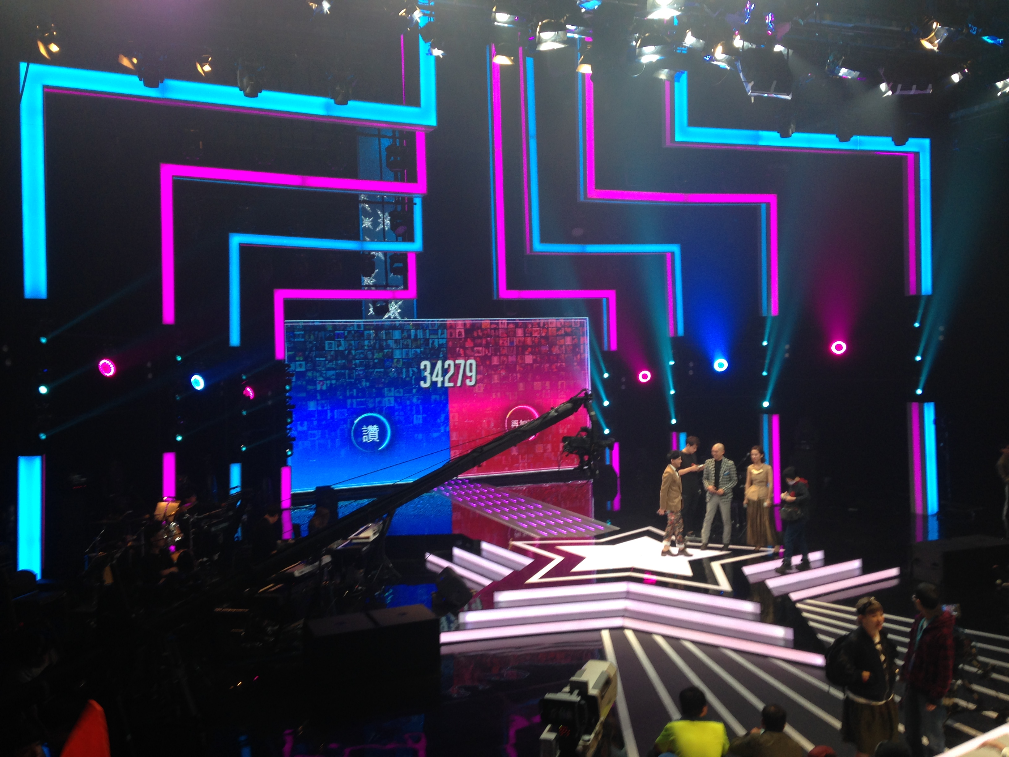 中國電視公司現場直播選秀節目《希望之星》攝影棚。